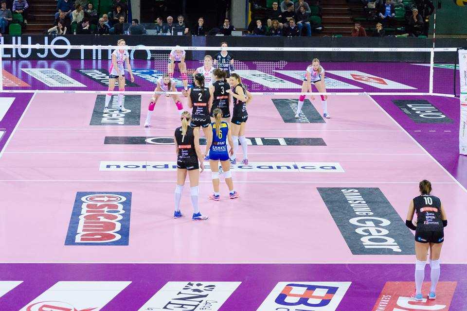 Vedi titolo